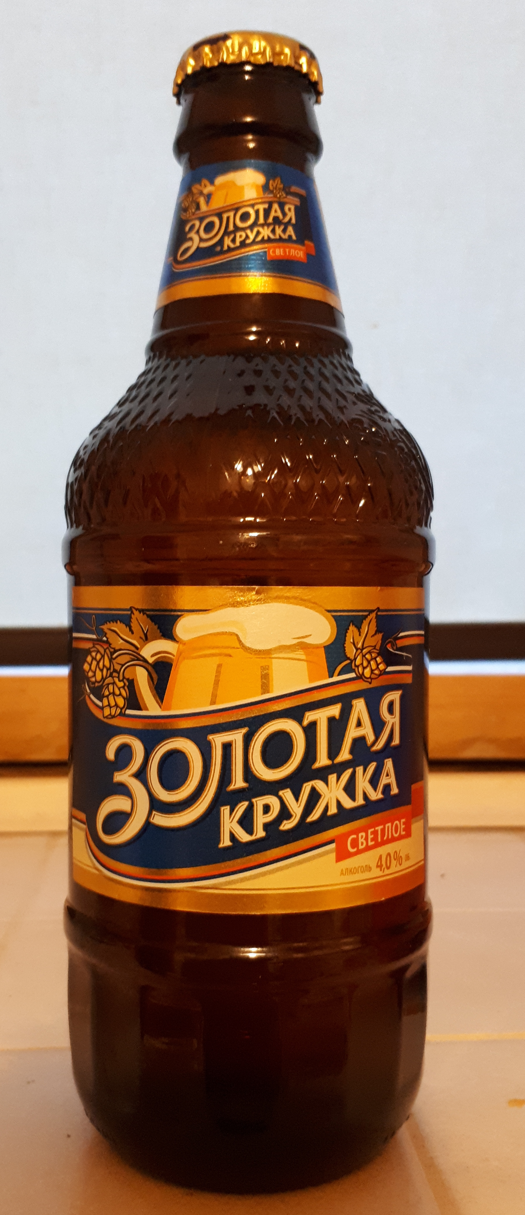 Бобруйский бровар